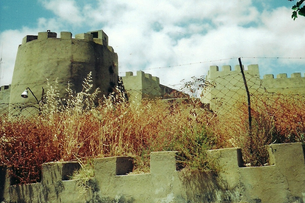 Forte de Almada, freguesia e concelho de Almada, distrito de Setúbal, Portugal.